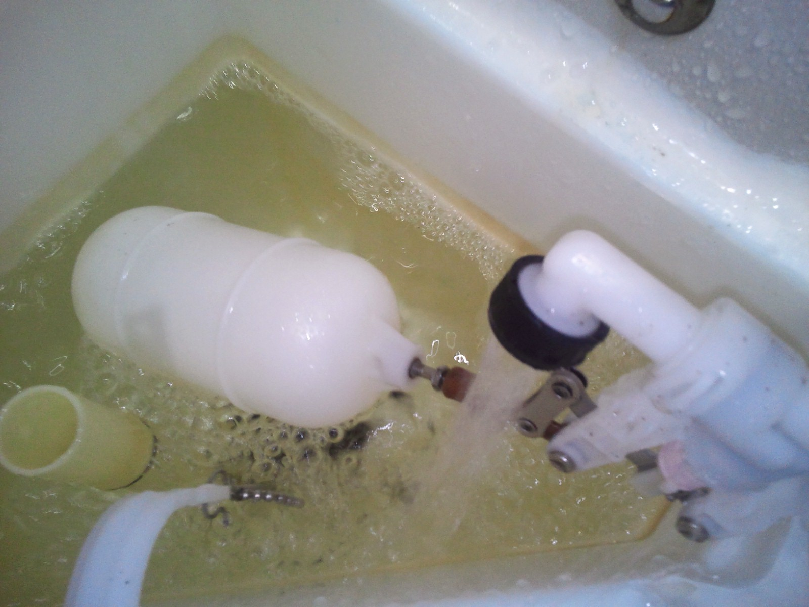 ボールタップ給水時